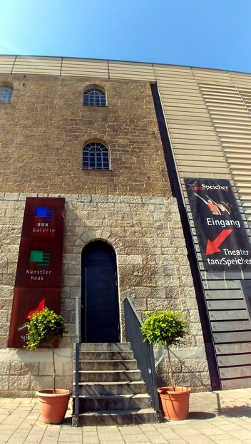 Aussenansicht Theater tanzSpeicher, Würzburg